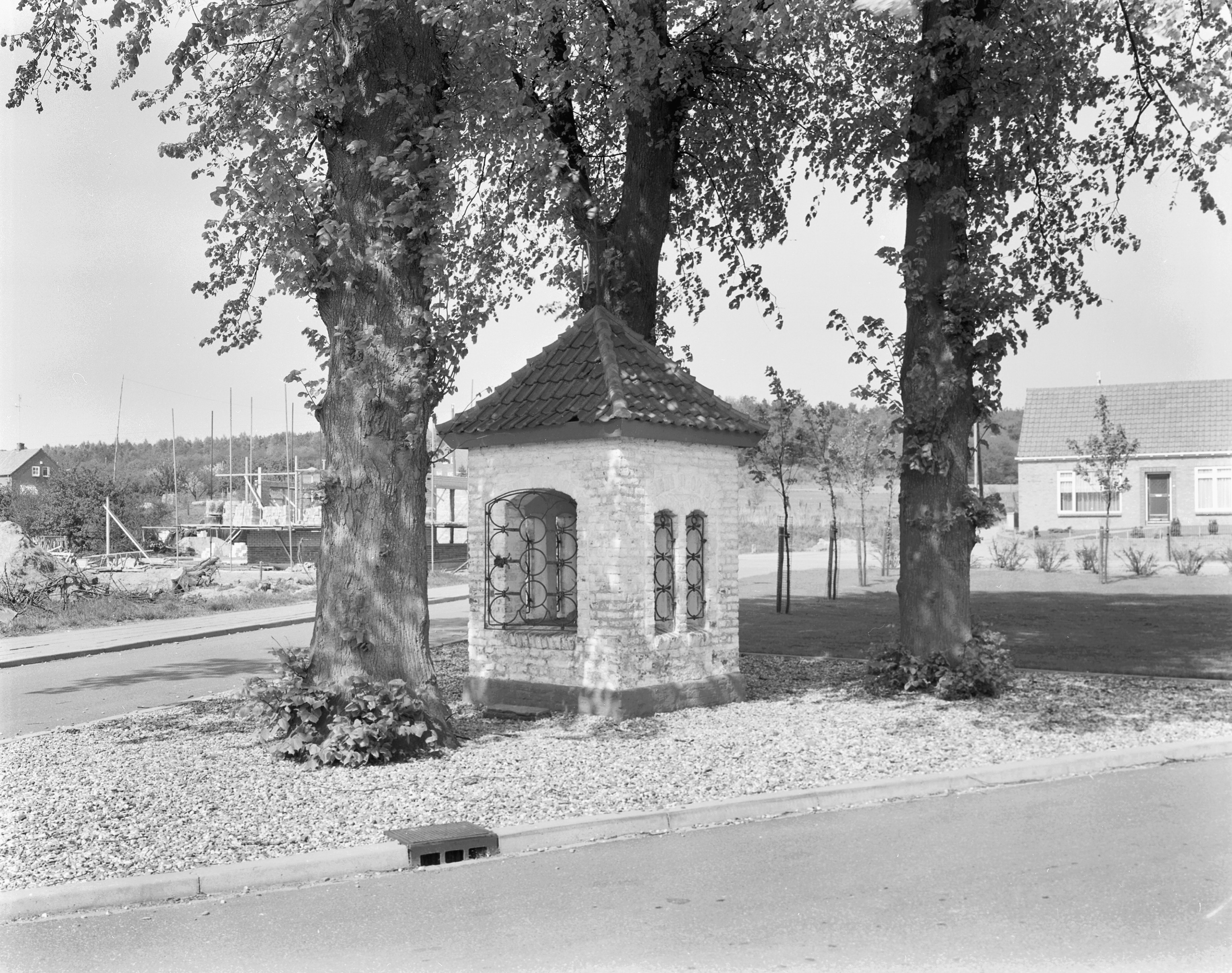 Mortel 7, aanzicht